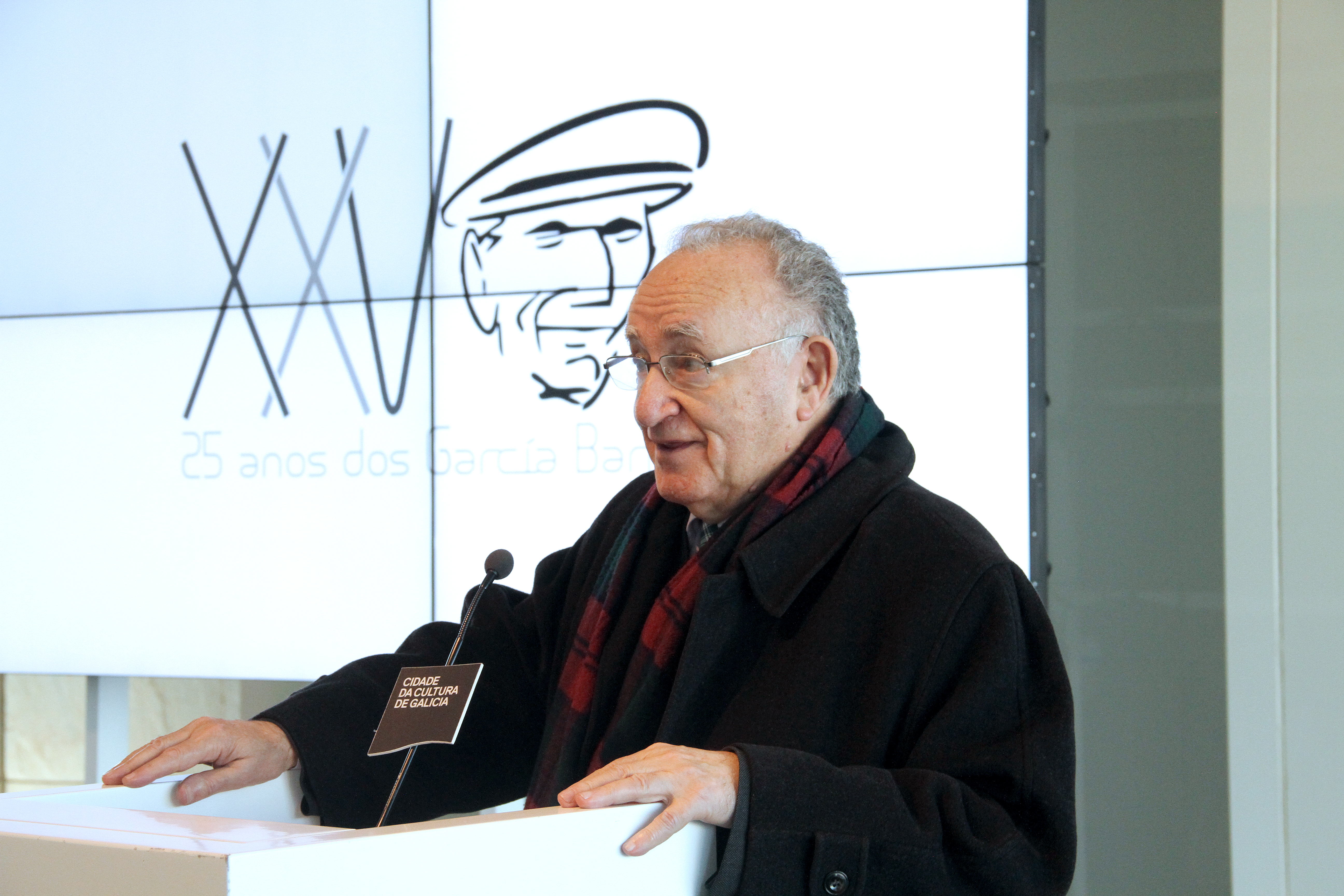 Xesús Alonso Montero no Premio Manuel García Barros 2014.